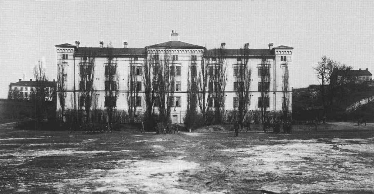 Pontonjärskasernen på Kungsholmen vid Jaktvarvsgränd 5. Arkitekt Edvard Medén